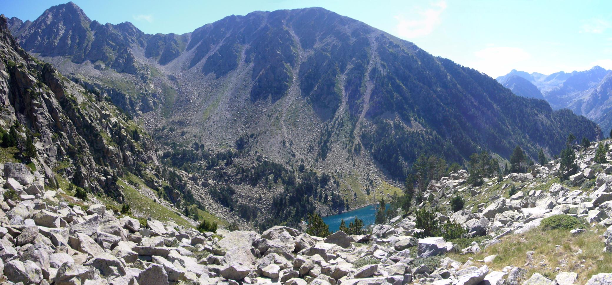 Vall de Sarradé vist des de la Pala Gespadera, la Vall de Boí, Alta Ribagorça, Catalunya